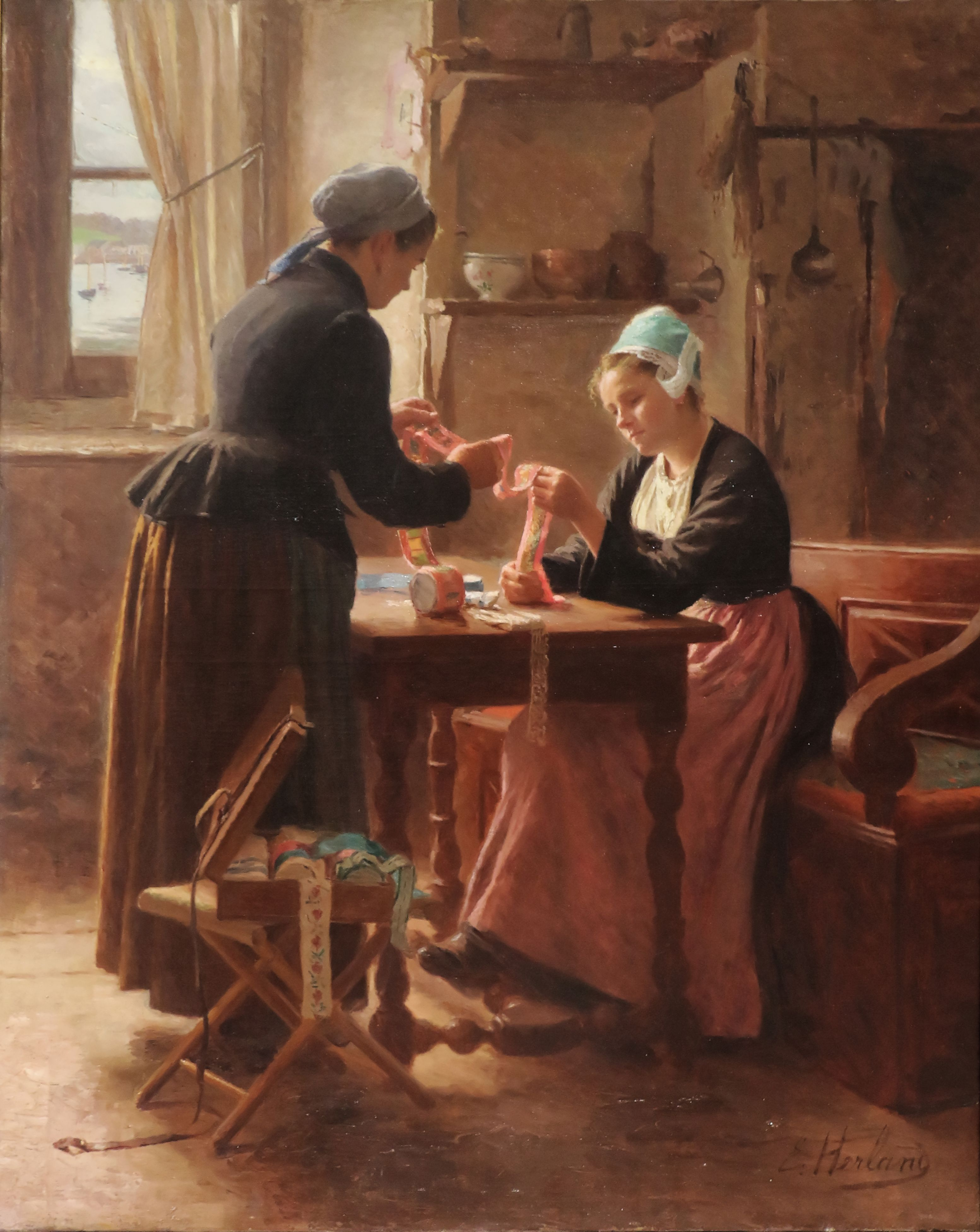 Tableau d'Emma Herland conservé au musée du Château de Vitré.